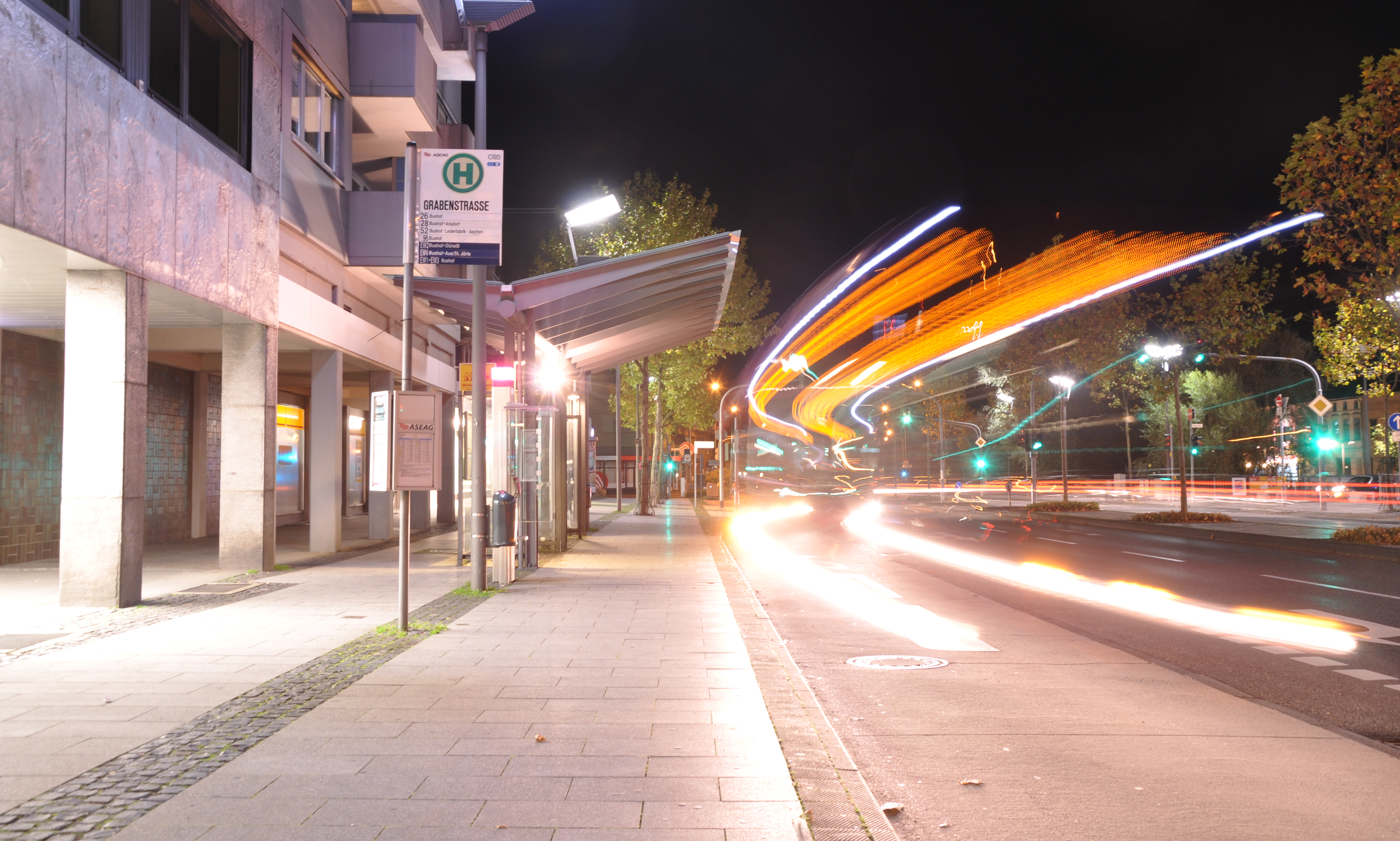 Die Innenstadt von Eschweiler an einem späten Sonntagabend im Oktober 2014. Das Bild wurde mit Stativ und langer Belichtungszeit aufgenommen.